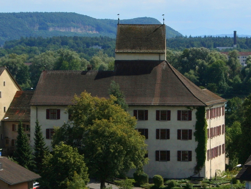 Schloss Klingnau vom Achenberg ausgesehen